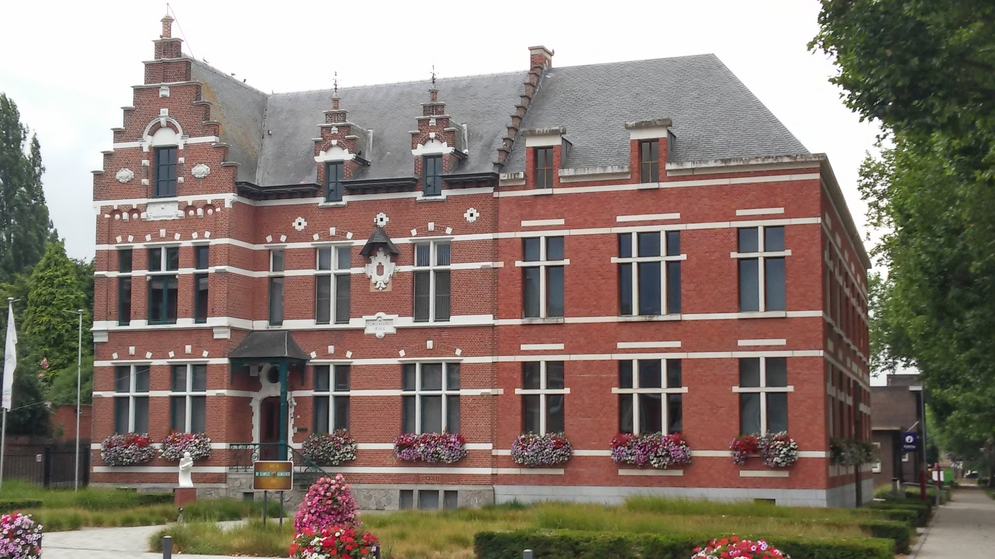 Gemeentehuis Niel in neotraditionele stijl anno 1890